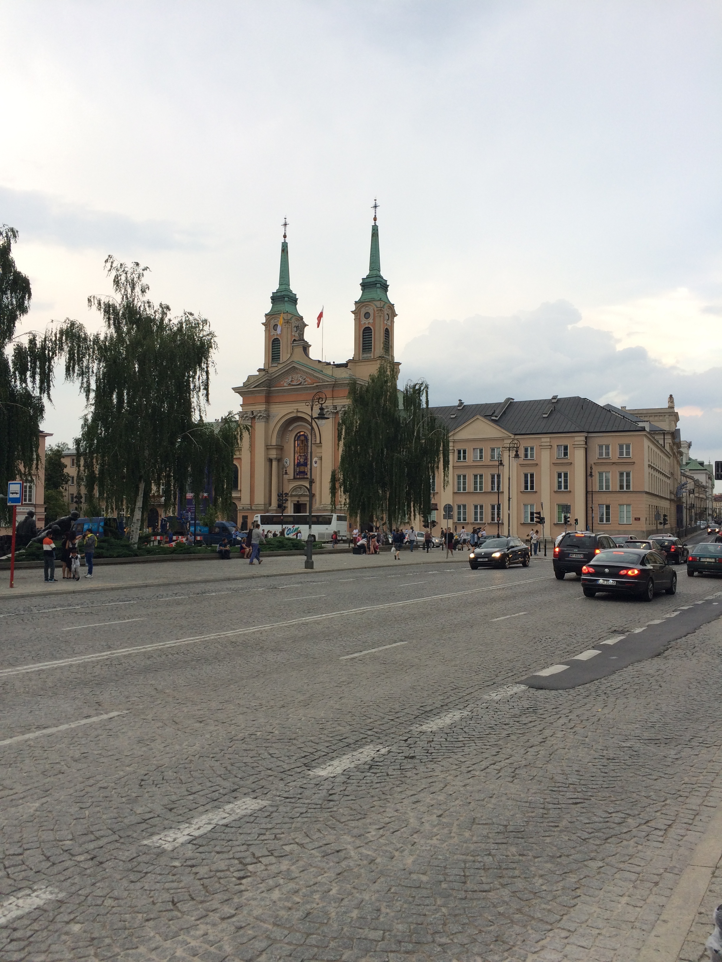 Krasiński-Platz (Plac Krasińskich) mit katedra polowa Wojska Polskiego (»Feld-Kathedrale der polnischen Armee«) in Warschaus Neustadt.